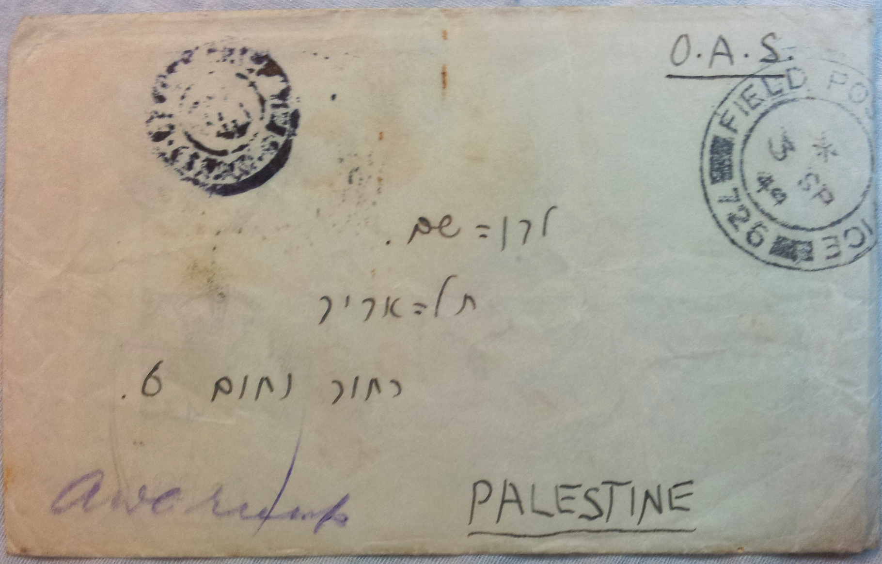 איגרת שנה טובה - מעטפה (מוענה ל-ישראל בן-שם, ברחוב נחום בתל אביב